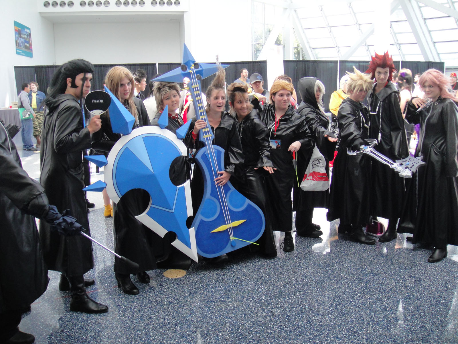 Anime Expo 2010 - LA